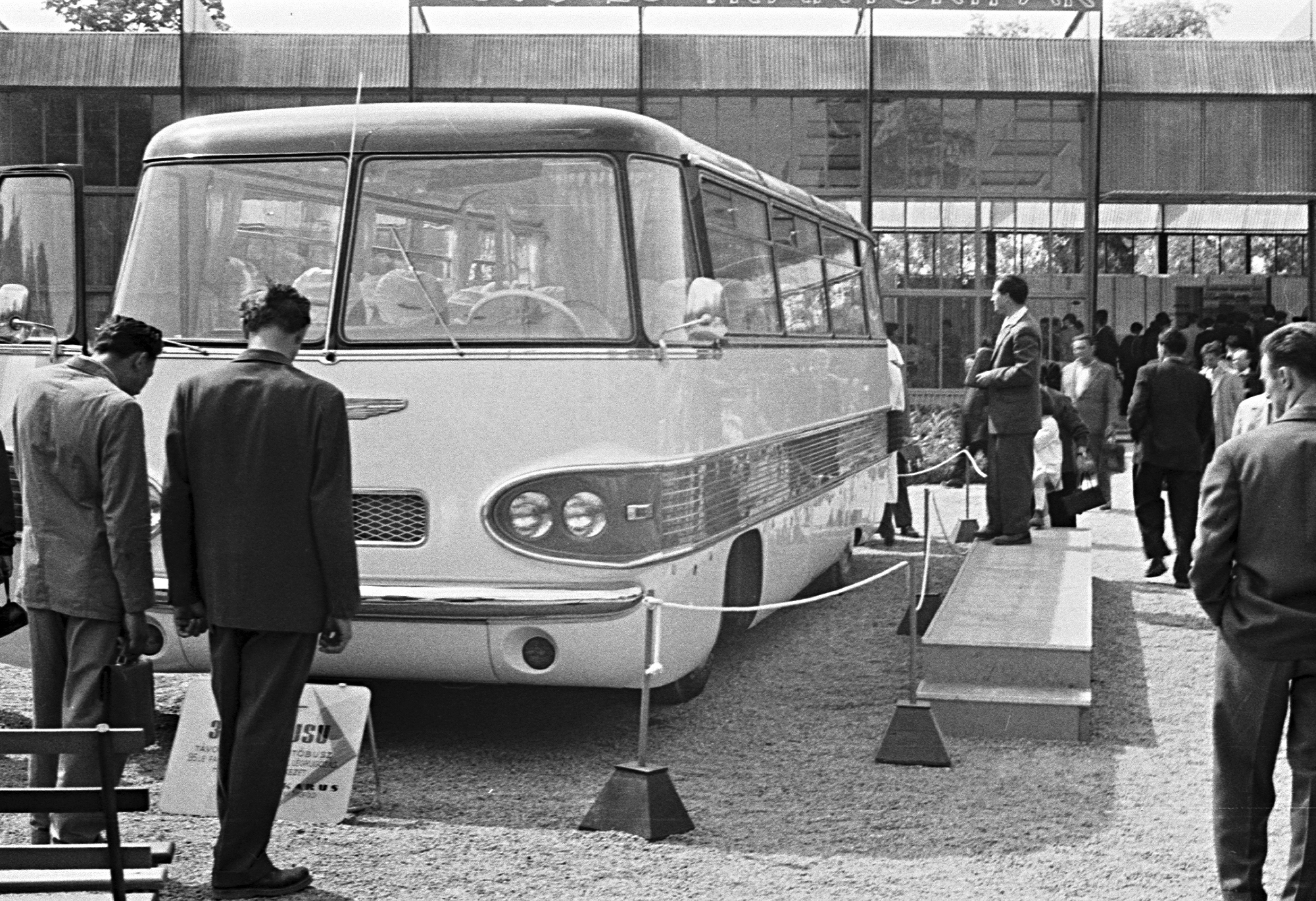 Budapesti Ipari Vásár. Ikarus 303 típusú autóbusz. Location: Hungary, Budapest XIV. Tags: international fair, Ikarus-brand, Hungarian brand, bus, genre painting, Budapest Title: Budapesti Ipari Vásár. Ikarus 303 típusú autóbusz.